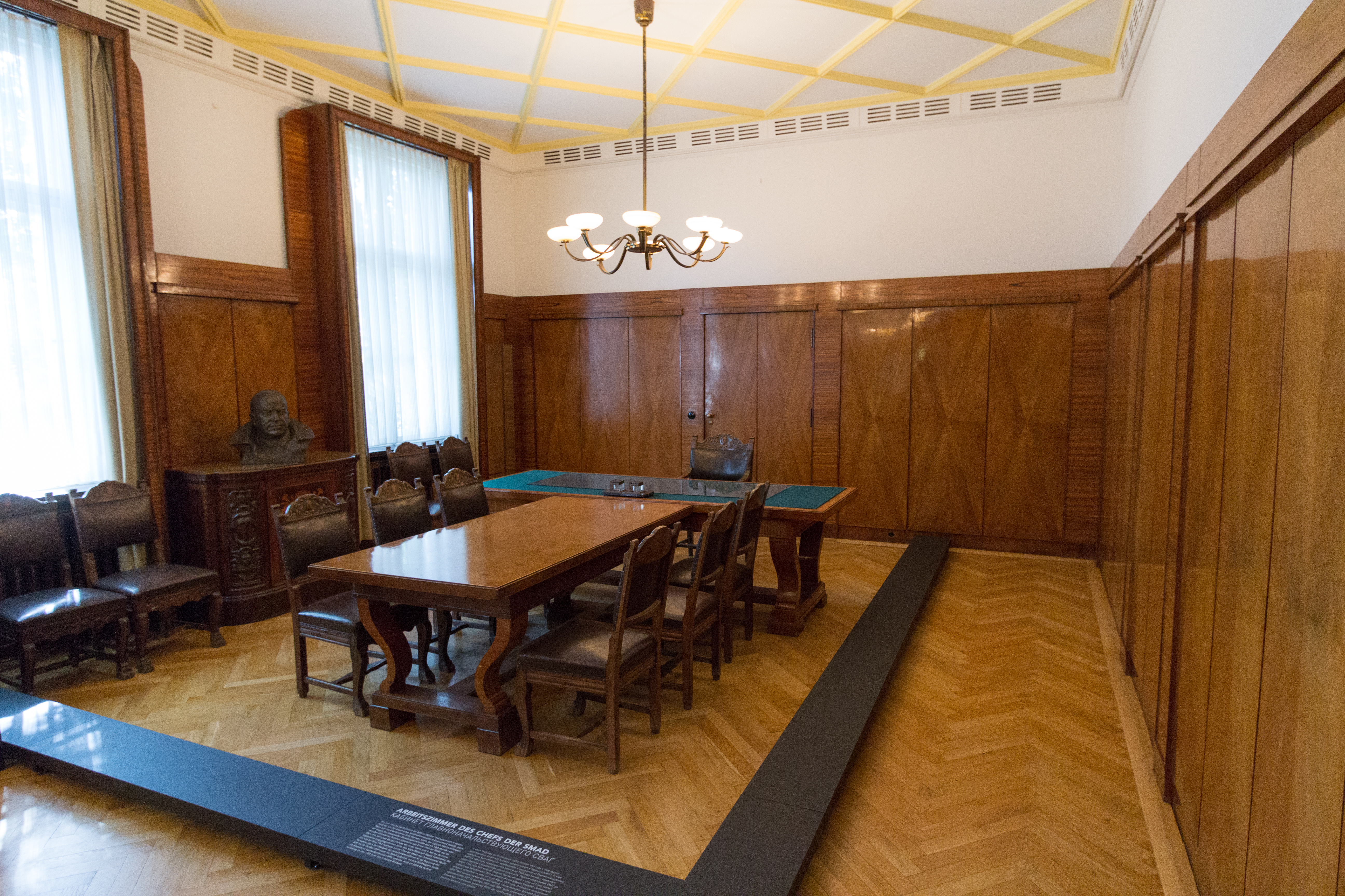 Büro des Chefs der Sowjetische Militäradministration in Deutschland, unter anderem Marshall Georgi Konstantinowitsch Schukow